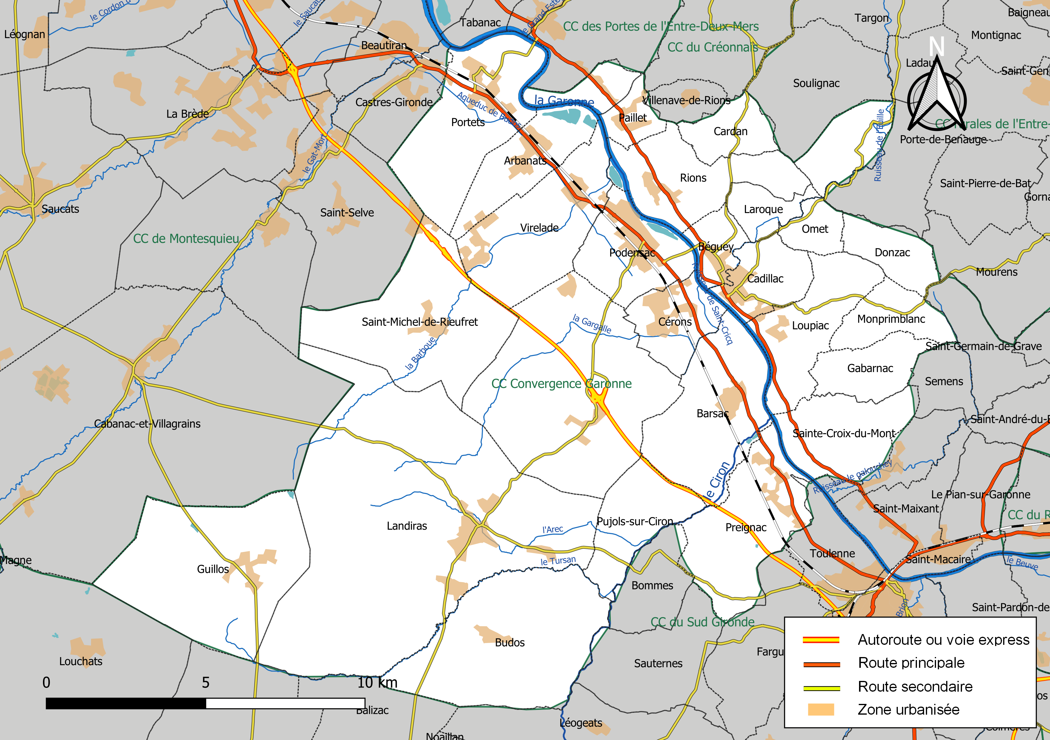 Carte géographique de la Communauté de communes Convergence Garonne, département de la Gironde, France. Composition au 1er janvier 2019.